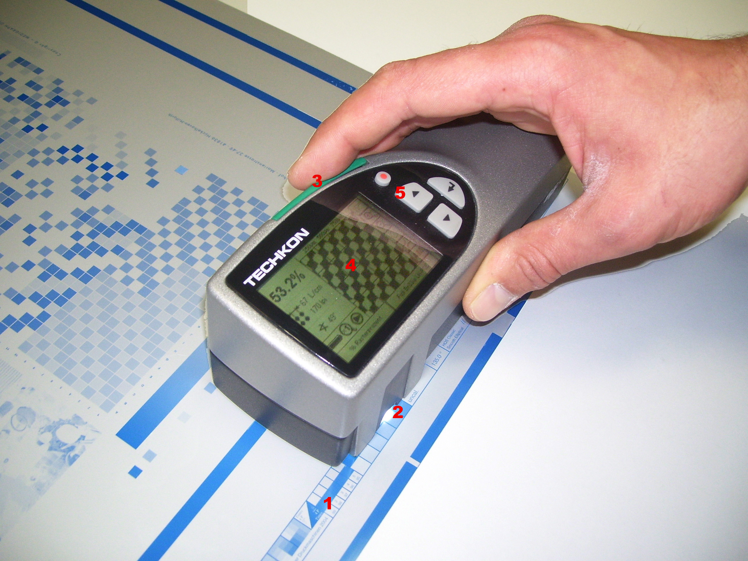 Messgerät für die Druckplattenmessung. Am Rand einer bebilderten und entwickelten Aluminiumdruckplatte wurde ein Rasterstufenkeil (1) mit ausgegeben. An den Messfeldern mit verschiedenen Rastertonwerten kann eine Kennlinie aufgenommen werden. Hierzu wird die Messoptik (2) – hier auch erkennbar am Fleck des weißen LED-Messlichts – nacheinander auf den Messfeldern positioniert, und jedes Mal wird eine Messung mit einer Bedientaste (3) ausgelöst. Das Vorschaubild als Positionierhilfe sowie Geräteinstellungen, die Messwerte und das Analysebild erscheinen im hochauflösenden Display (4). Zur menügestützten Funktionsauswahl stehen Richtungs- und Bestätigungstasten (5) zur Verfügung.